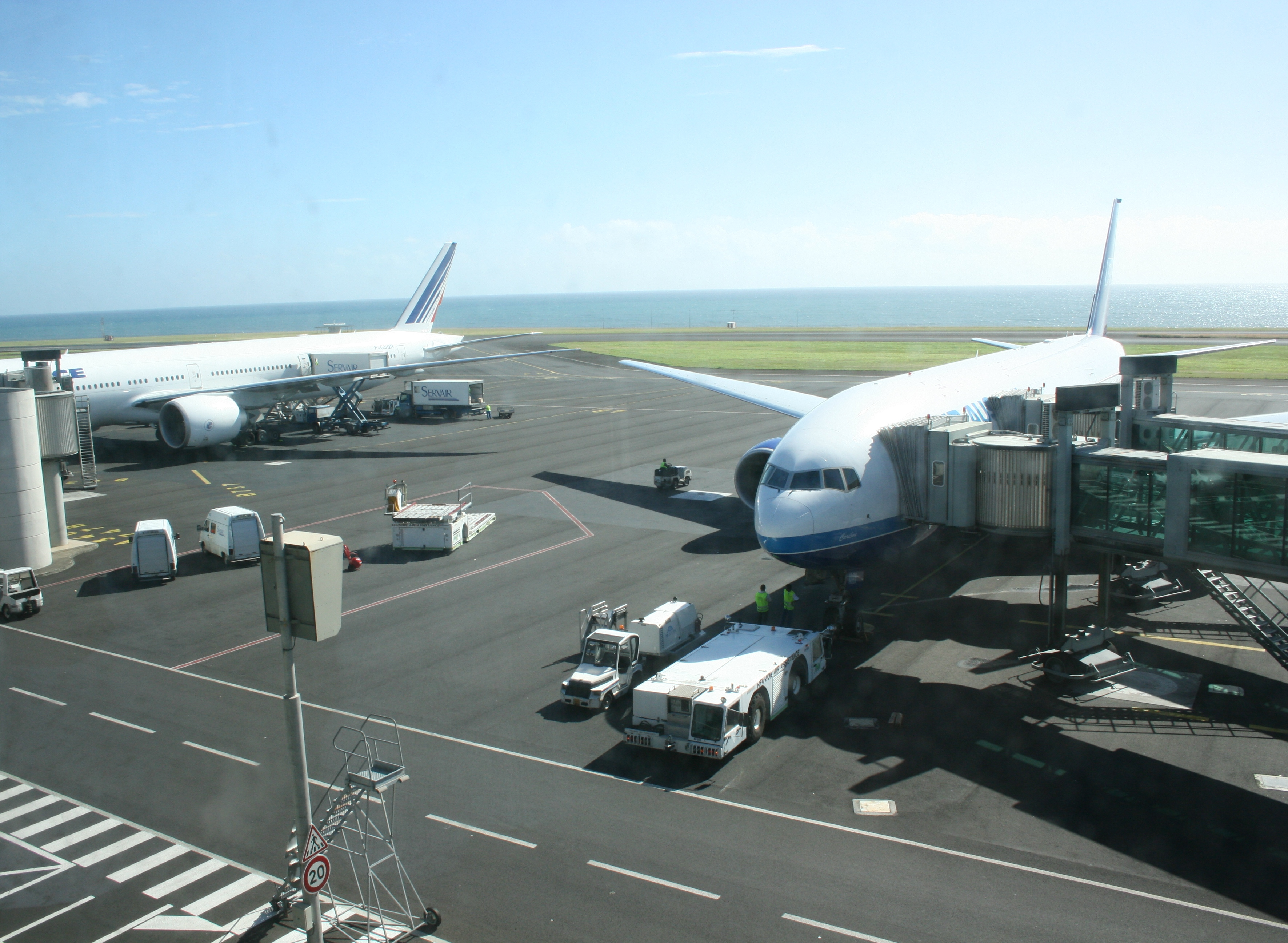 Avions stationnés sur le tarmac de l'aéroport de la Réunion